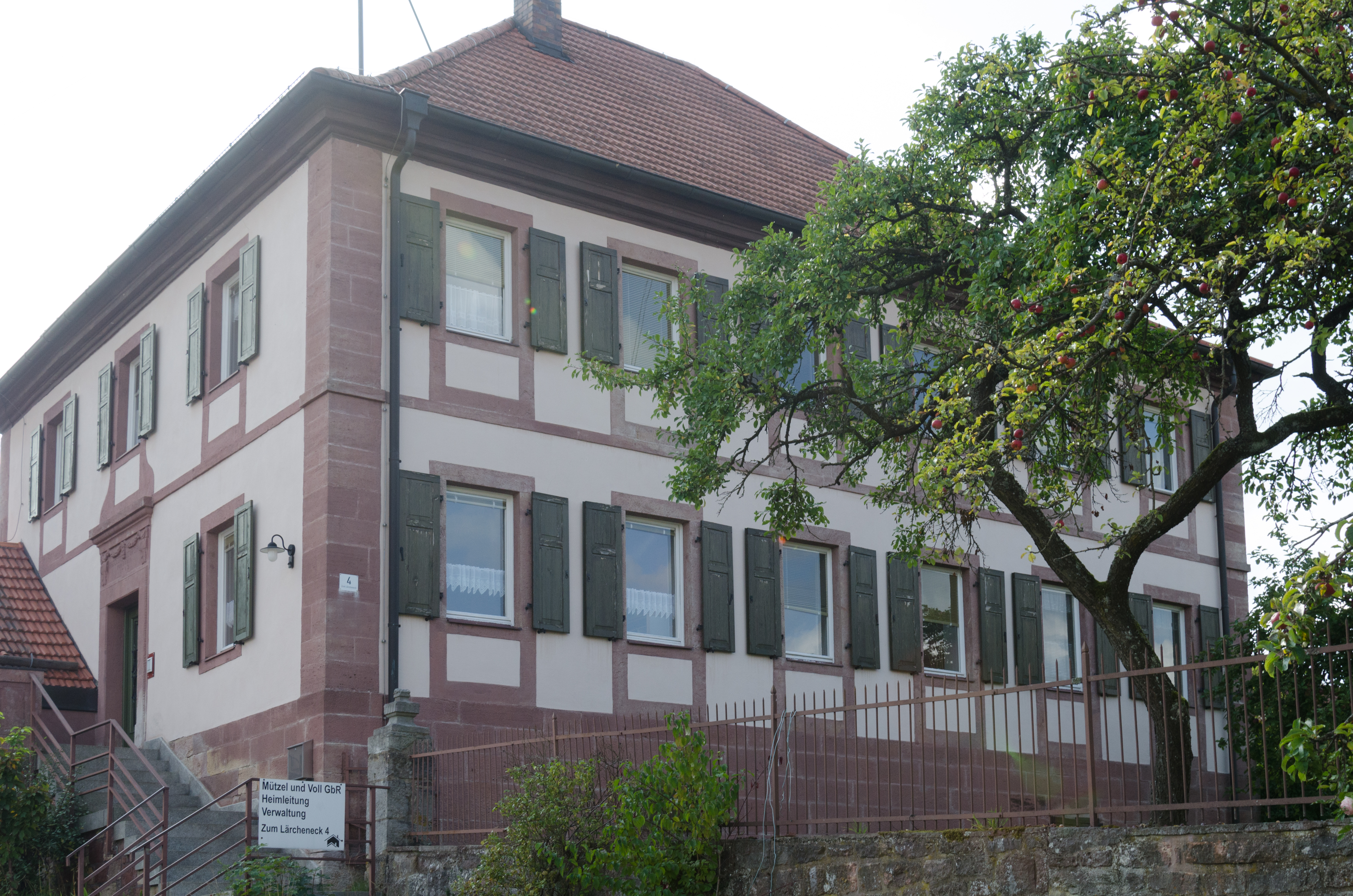 Burkardroth, Waldfenster, Zum Lärcheneck 4